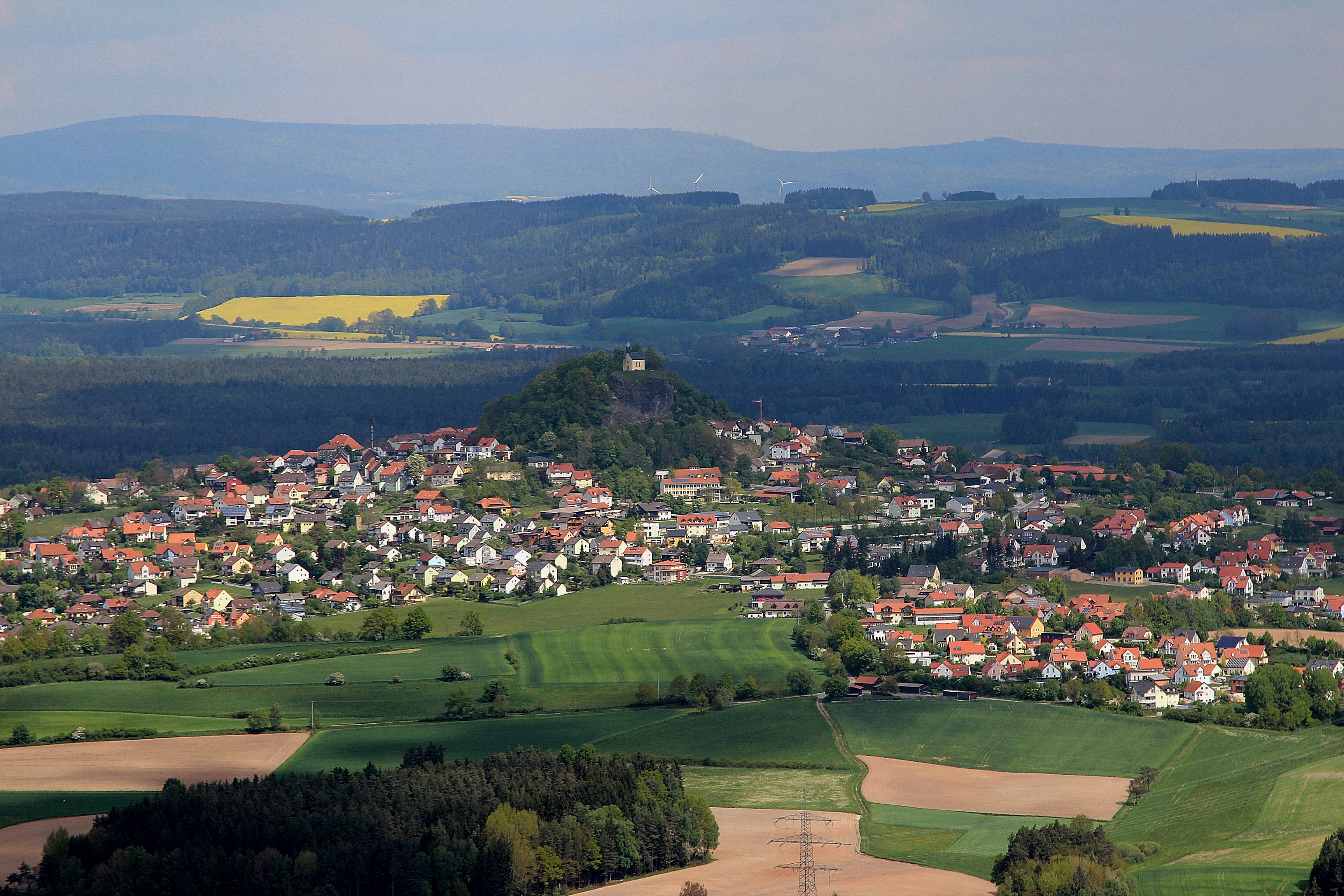 Parkstein, Landkreis Neustadt an der Waldnaab, Oberpfalz, Bayern